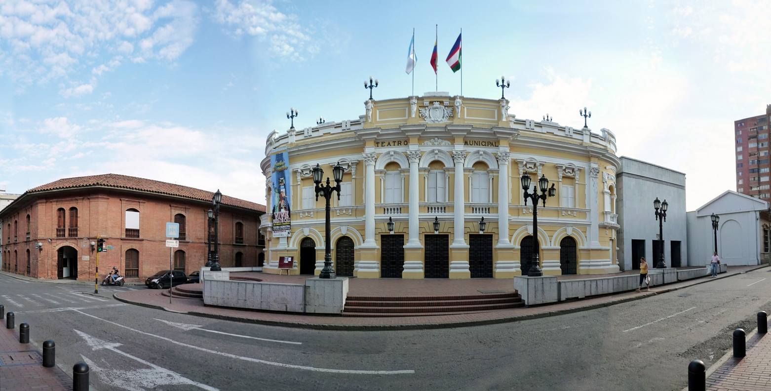 Teatro Municipal de Santiago de Cali